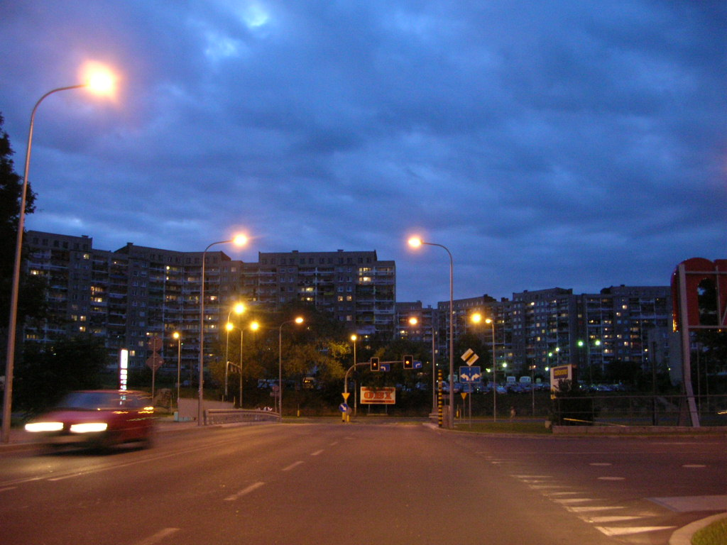 Wałbrzych - Osiedle Podzamcze , parking pod hipermarketem Auchan.